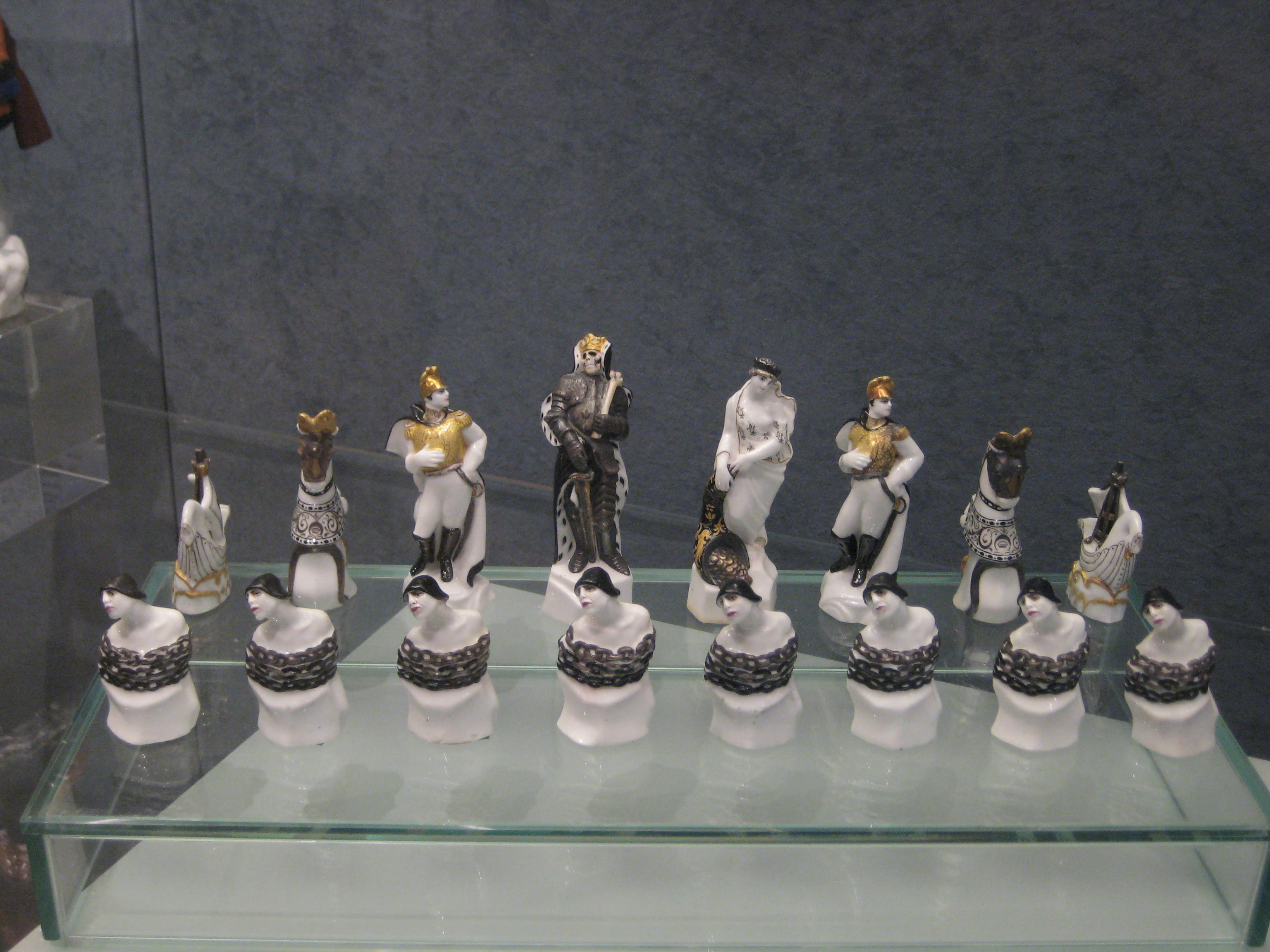 Советские фарфоровые шахматы "Красные и белые". ВМДПНИ